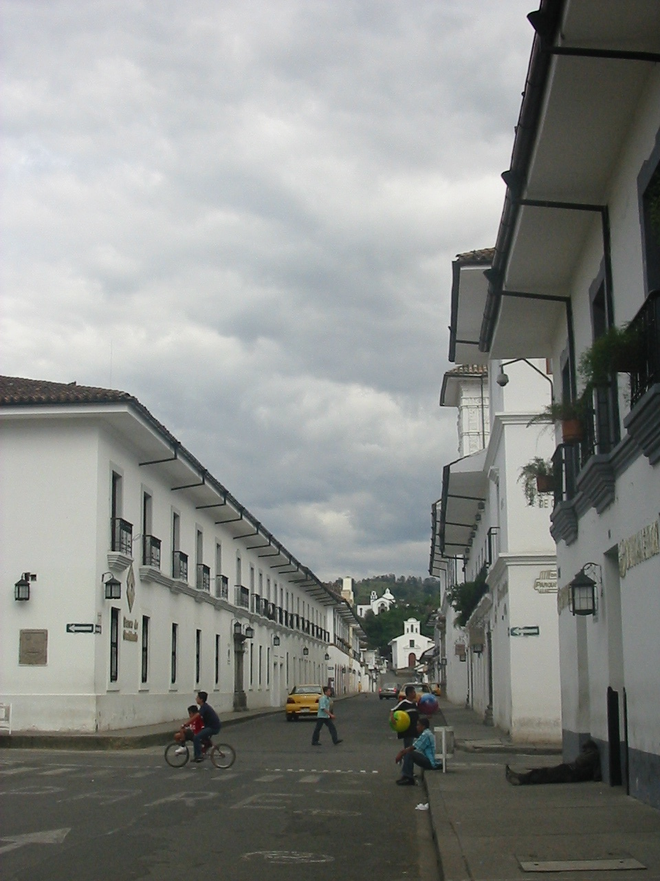 Popayán-Colombia downtown